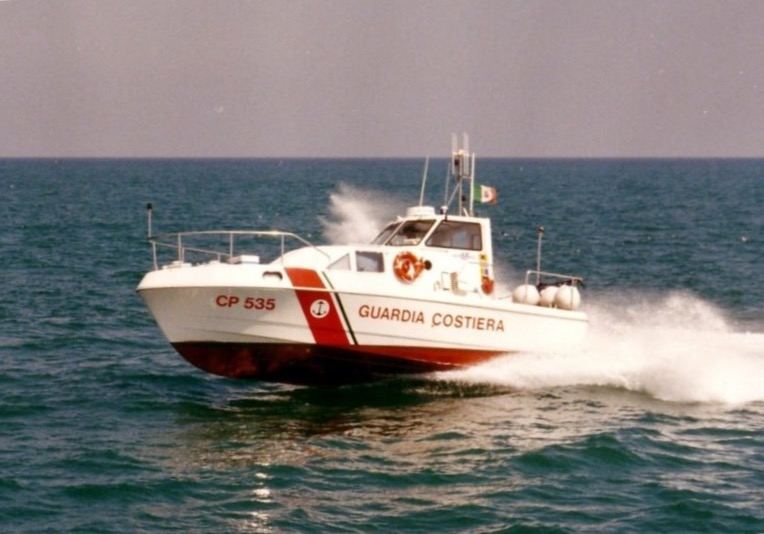 Motovedetta classe 500 utilizzata dall'Ufficio Circondariale Marittimo di Fano